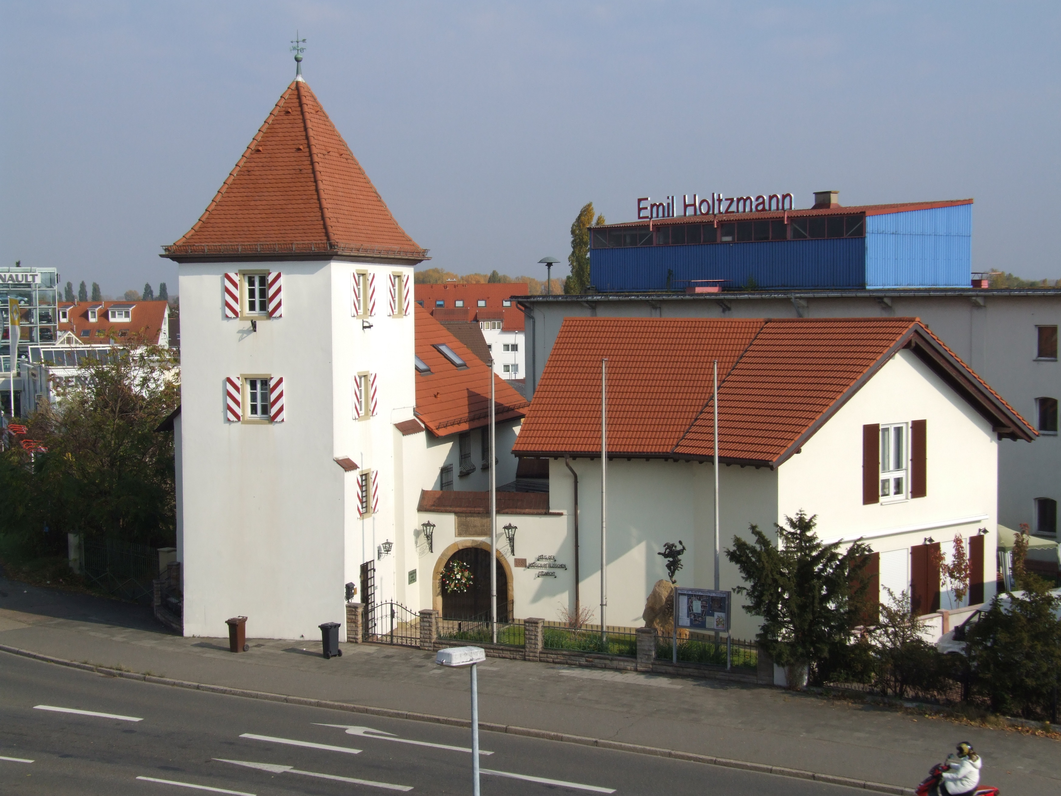 Warturm, Speyer, Haus der Badisch-Pfälzischen Fastnacht